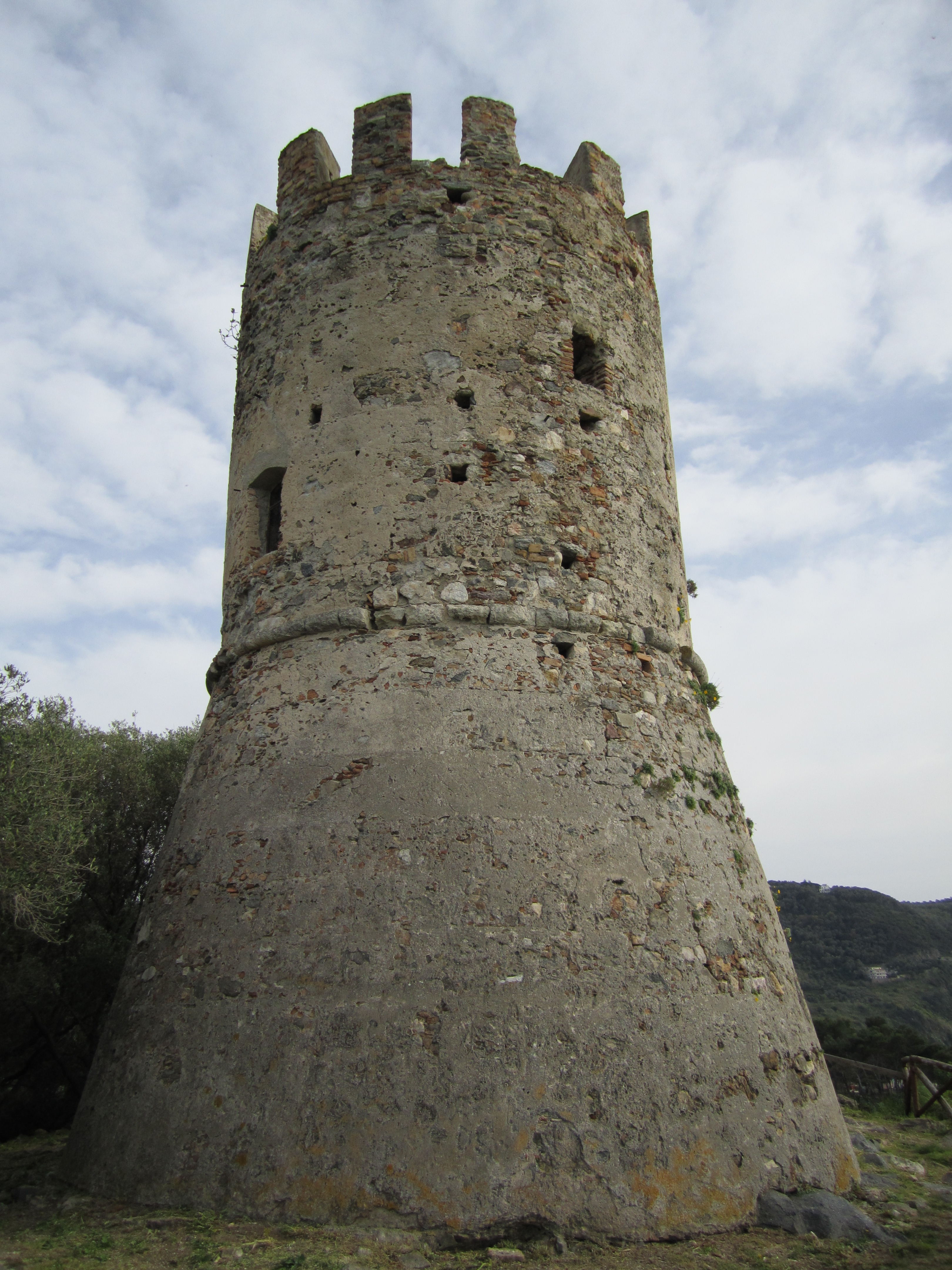 Torre Saracena del Parco Archeologico dei Taureani di Palmi (RC).